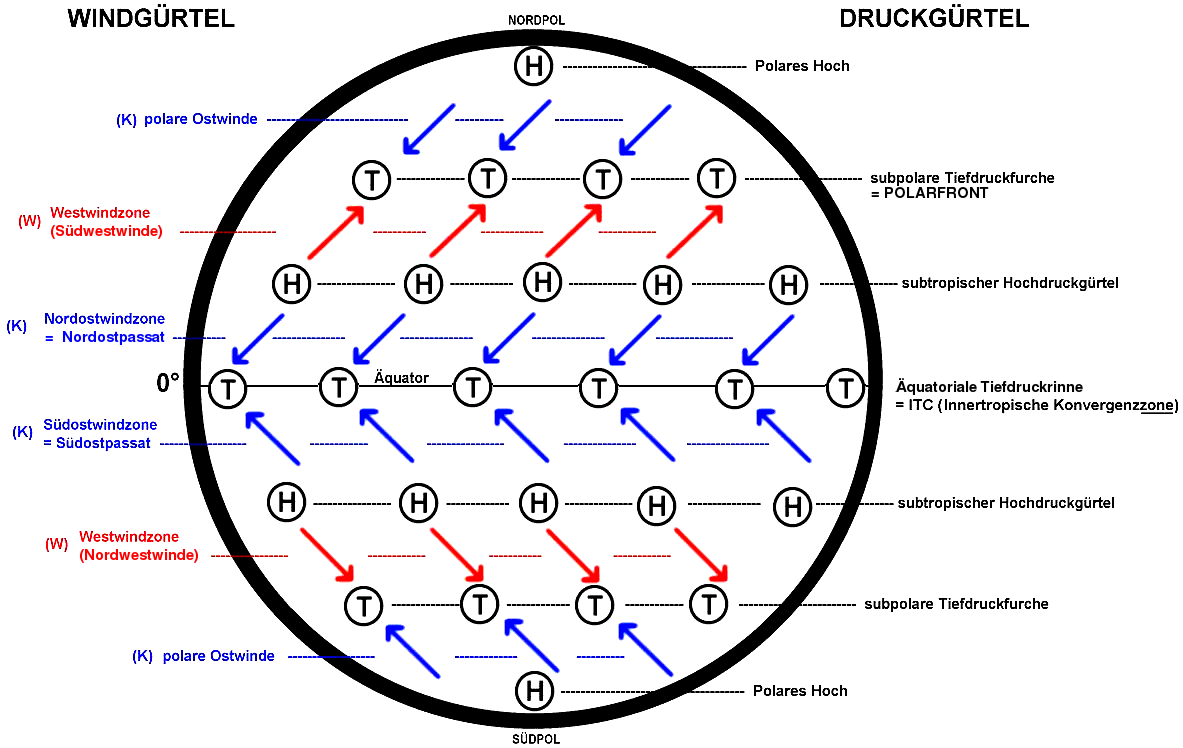 Wind und Druckgürtel der Erde